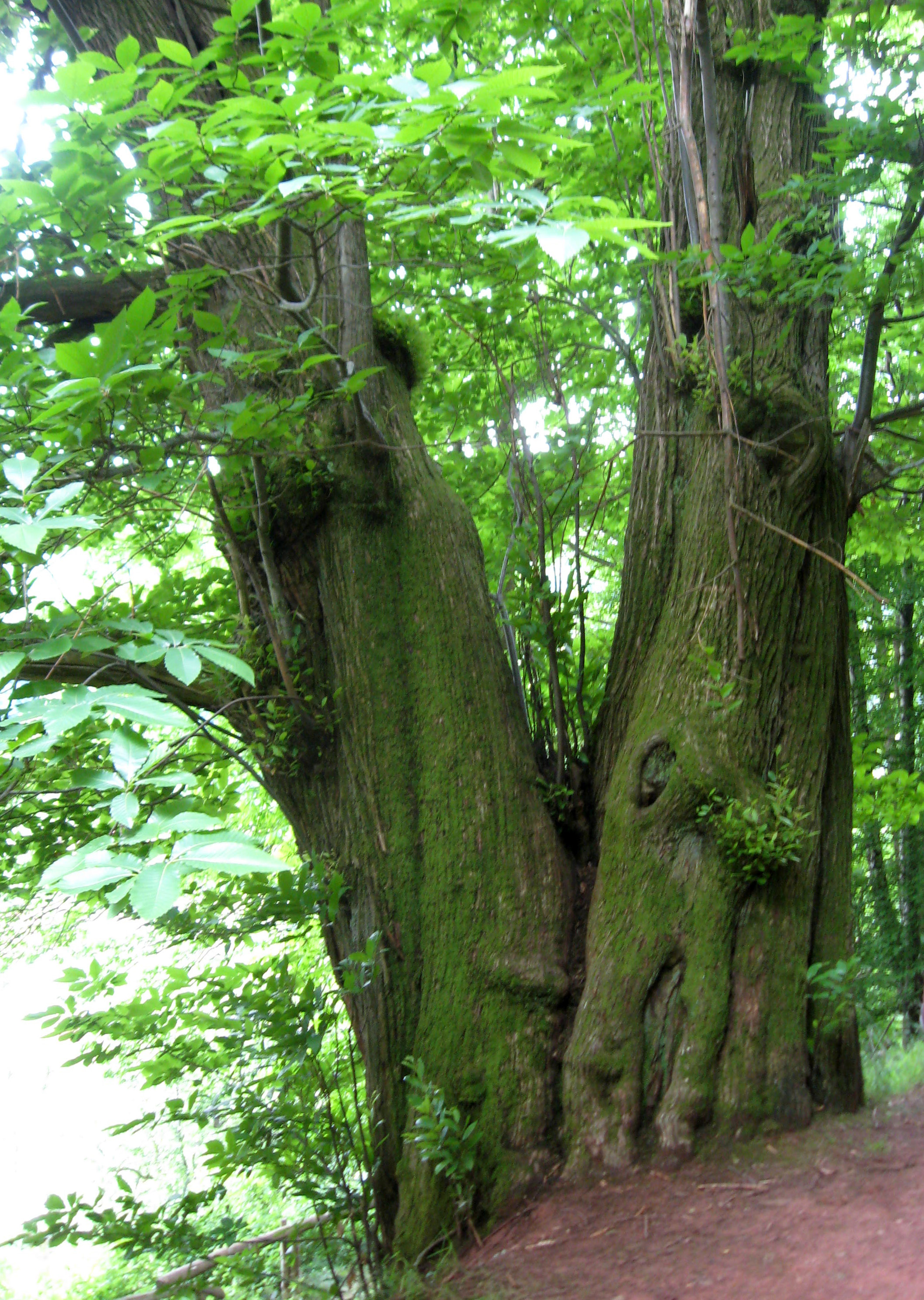 Dicke Kastanie, Edelkastanie am Kestenbusch bei Ramberg; Stammumfang ca. 6,40 m